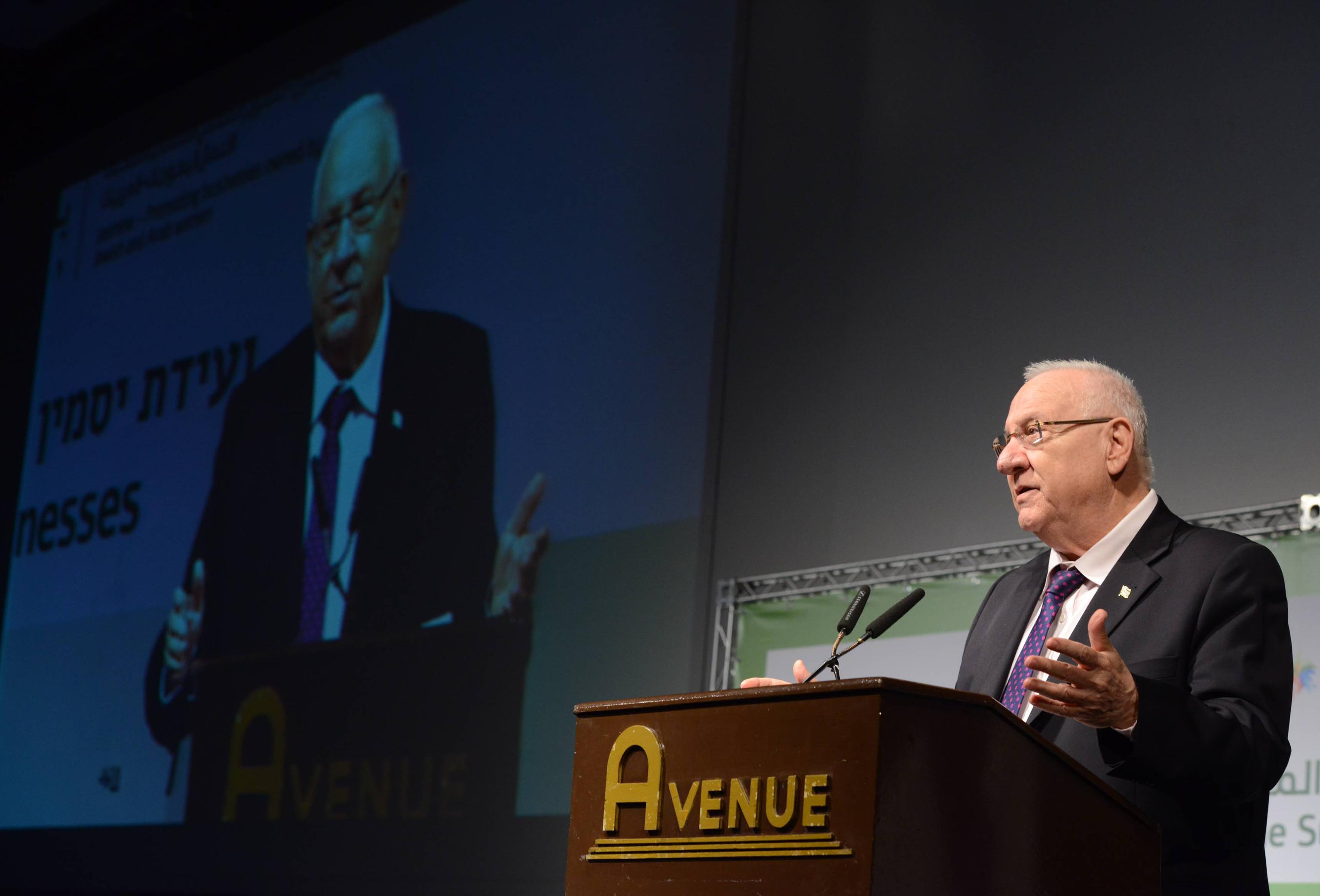 נשיא המדינה נושא דברים בוועידת יסמין השנתית לקידום עסקים קטנים ובינוניים העומדת בשנת 2014 בסימן עסקים בבעלות נשים כמנוע צמיחה כלכלי.